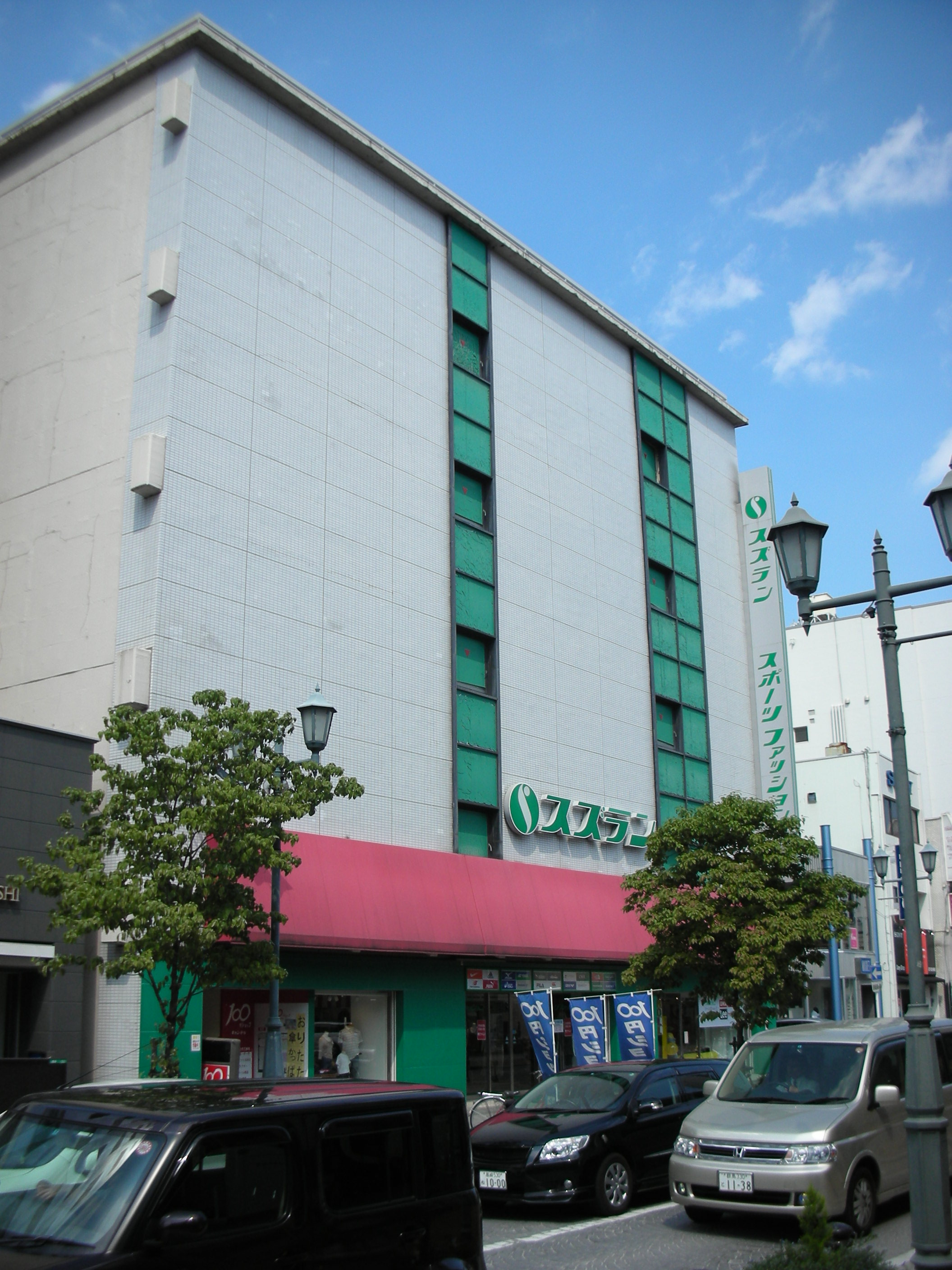 スズラン高崎店スポーツファッション館の外観